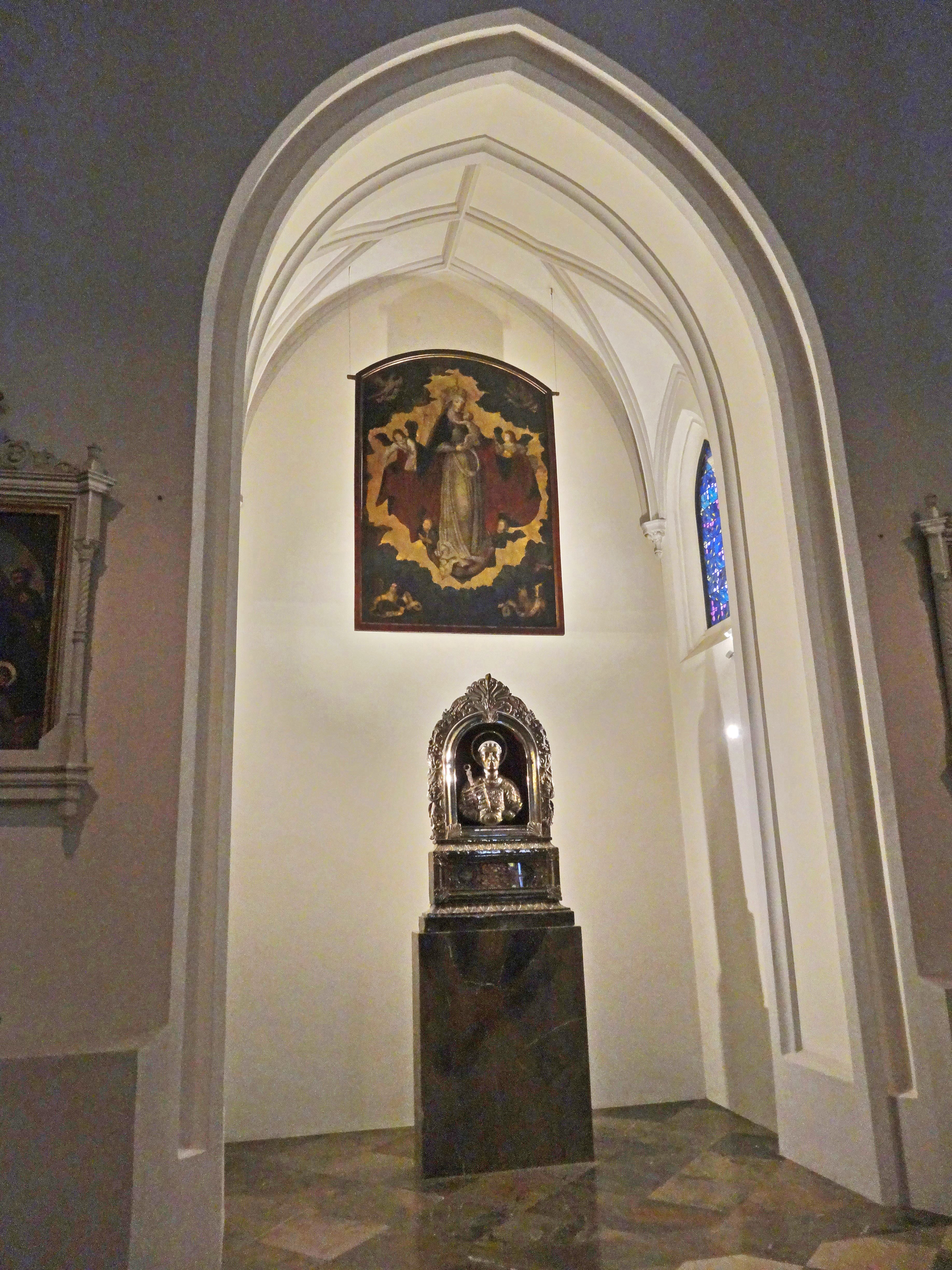 Stadtpfarrkirche St. Nikolaus (Rosenheim), nördliche Seitenkapelle mit Tafelbild der Schutzmantelmadonna und Büstenreliquiar des hl. Laurentius